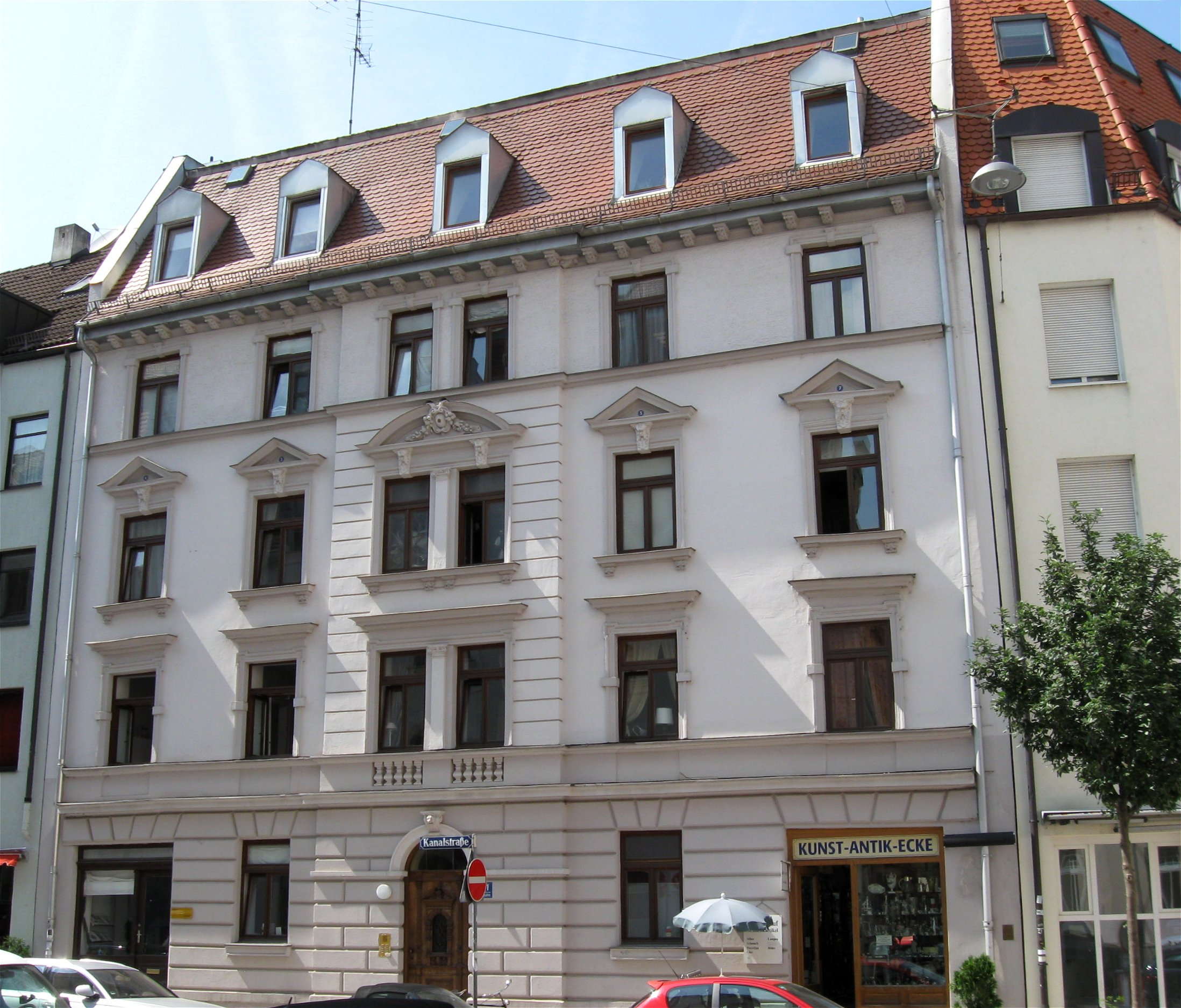 Kanalstraße 11; Mietshaus, viergeschossiger Mansarddachbau mit flachem Mittelrisalit, errichtet in den Formen der Neurenaissance von Gottfried Hohenleitner 1887/88.